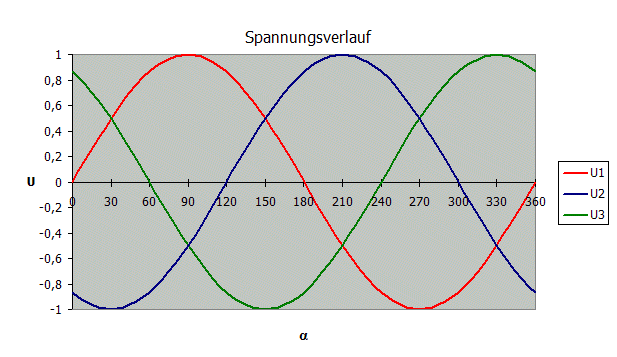 Verlauf der Spannungen U1, U2 und U3 im Dreiphasen-Wechselstromsystem; own work; author: J. Lakermann